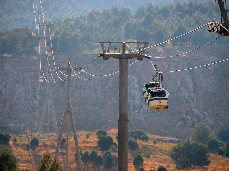 רכבל צוק מנרה. צולם על ידי אליעזר שוורץ, ירושלים.